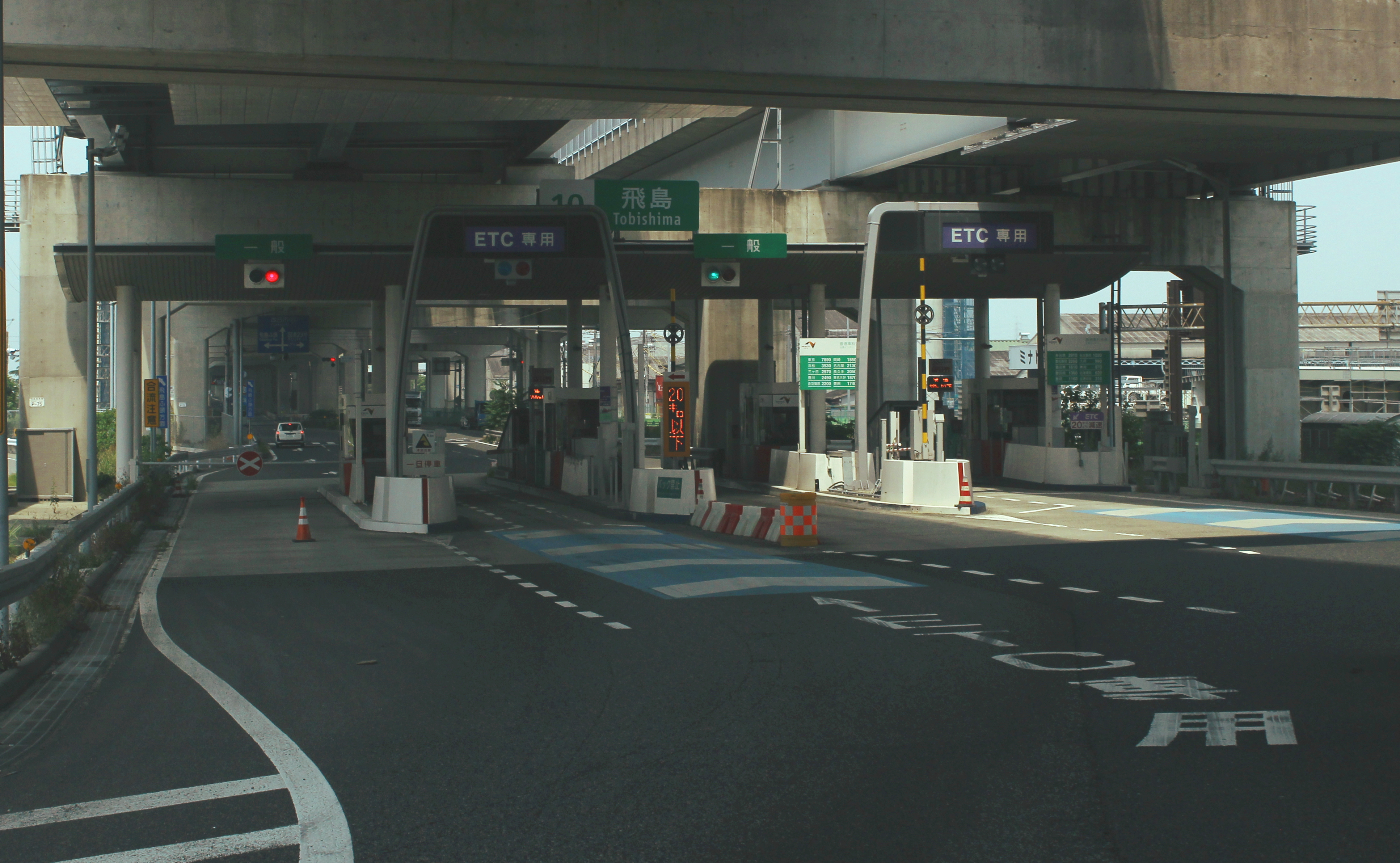 伊勢湾岸道路 飛島インターチェンジトールゲート